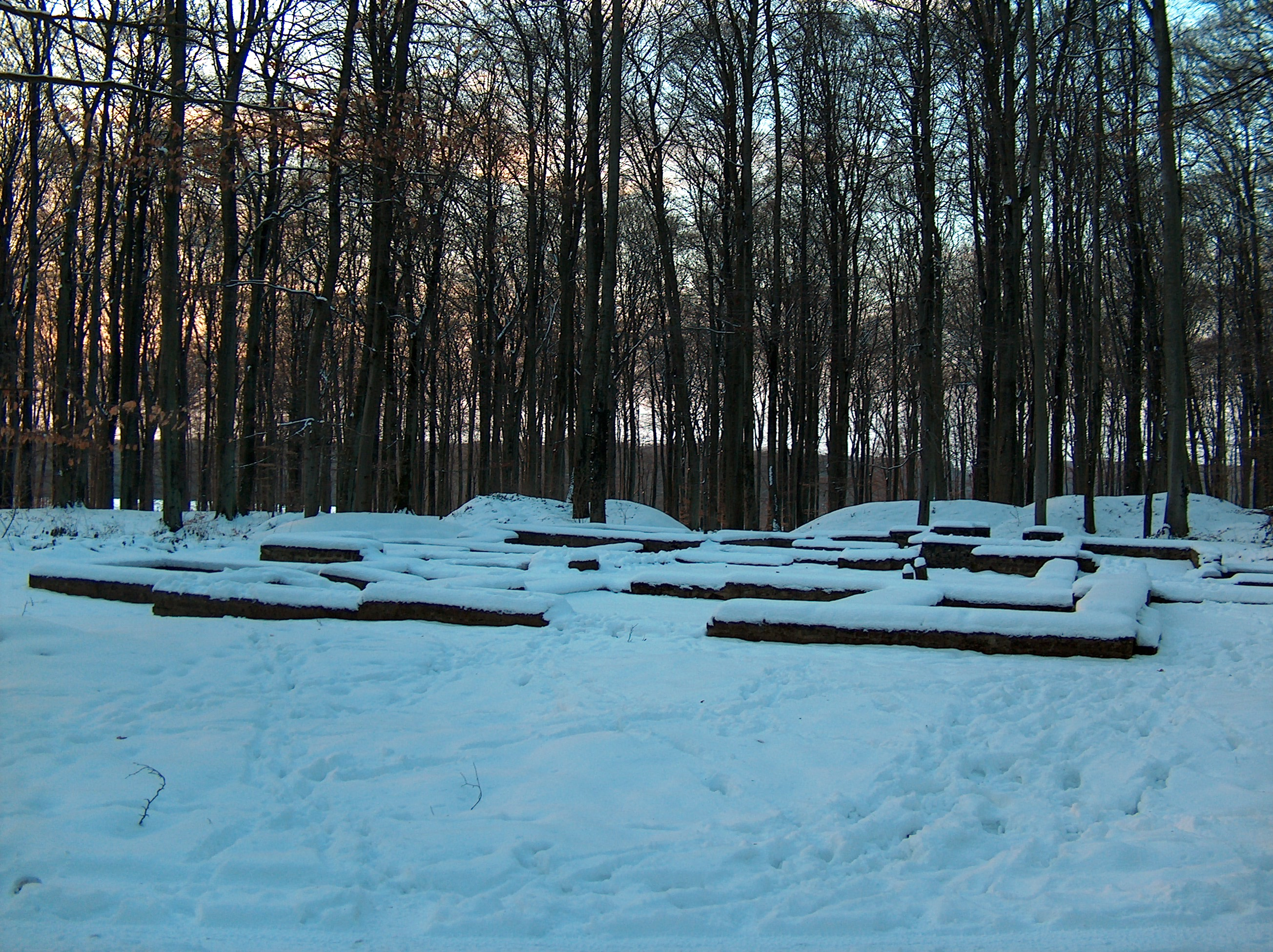 Éischt Haaptwunngebai